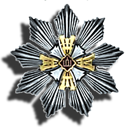 Liettuan Gediminasin ritarikunnan suurristin rintatähti.